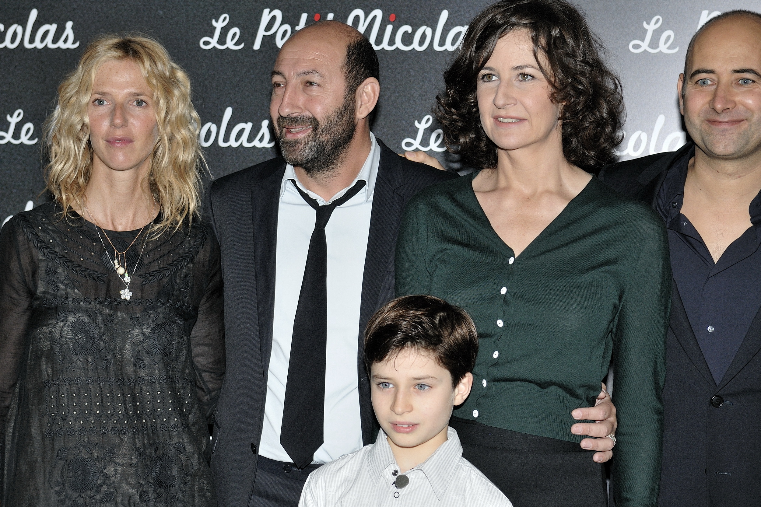 Avant-première du Film Le Petit Nicolas au Grand Rex, à Paris, le 20 Septembre 2009, en présence de toute l'équipe de film. Ici, de gauche à droite : Sandrine Kiberlain, Kad Merad, Maxime Godart, Valérie Lemercier, et le réalisateur Laurent Tirard.